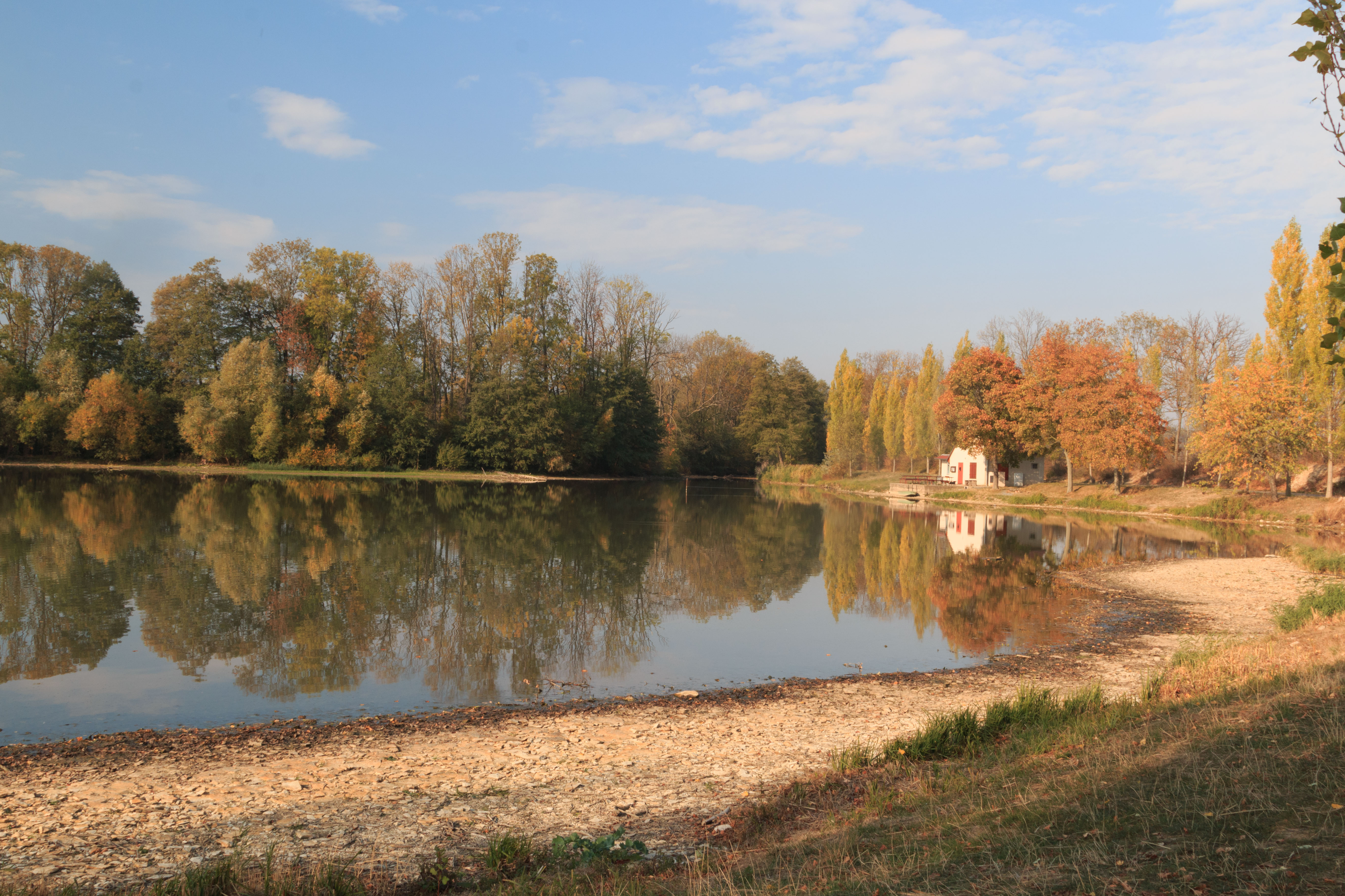 Návesní rybník v Kunčí Project: Vodstvo Ticket: 1618.